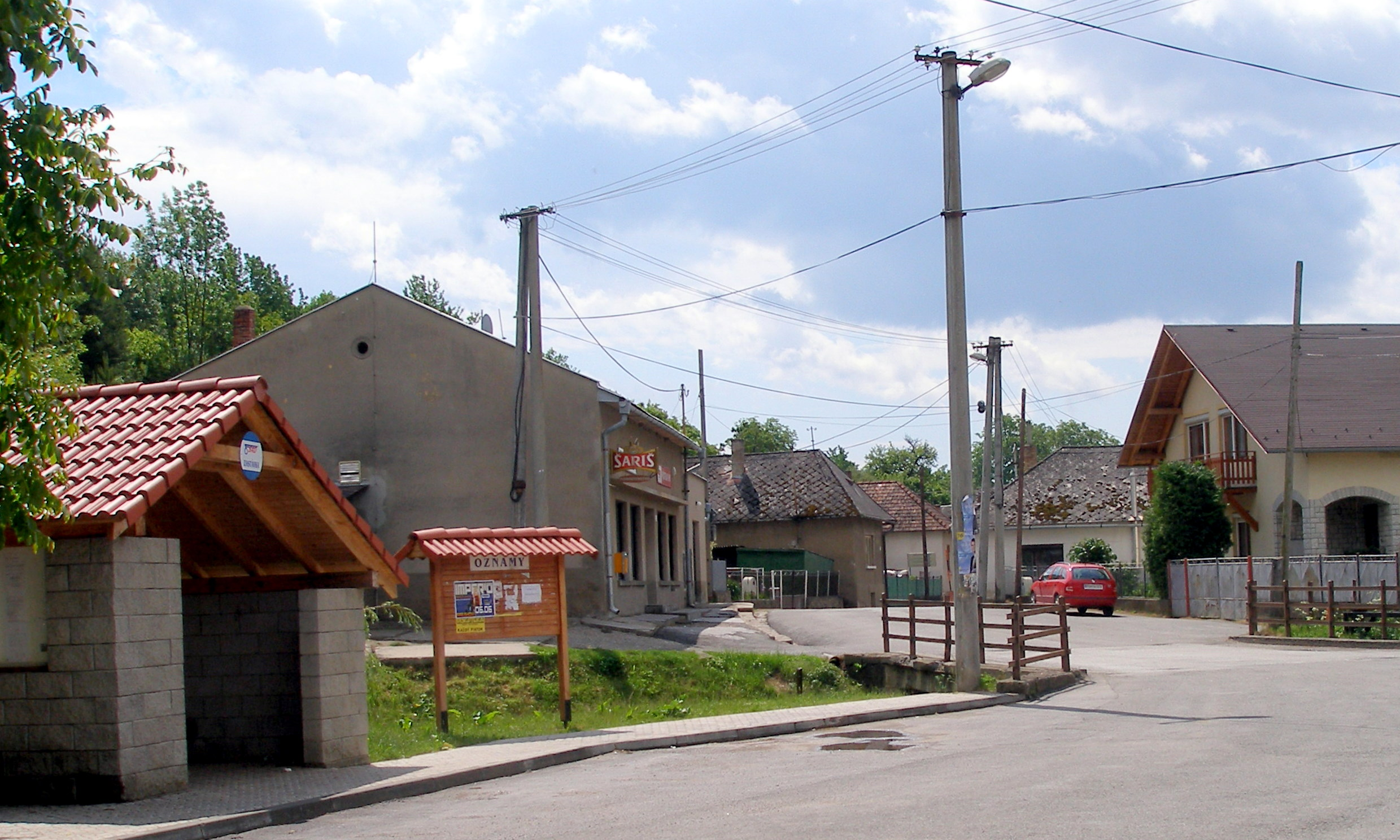 Obec Šarišské Sokolovce okres Sabinov.